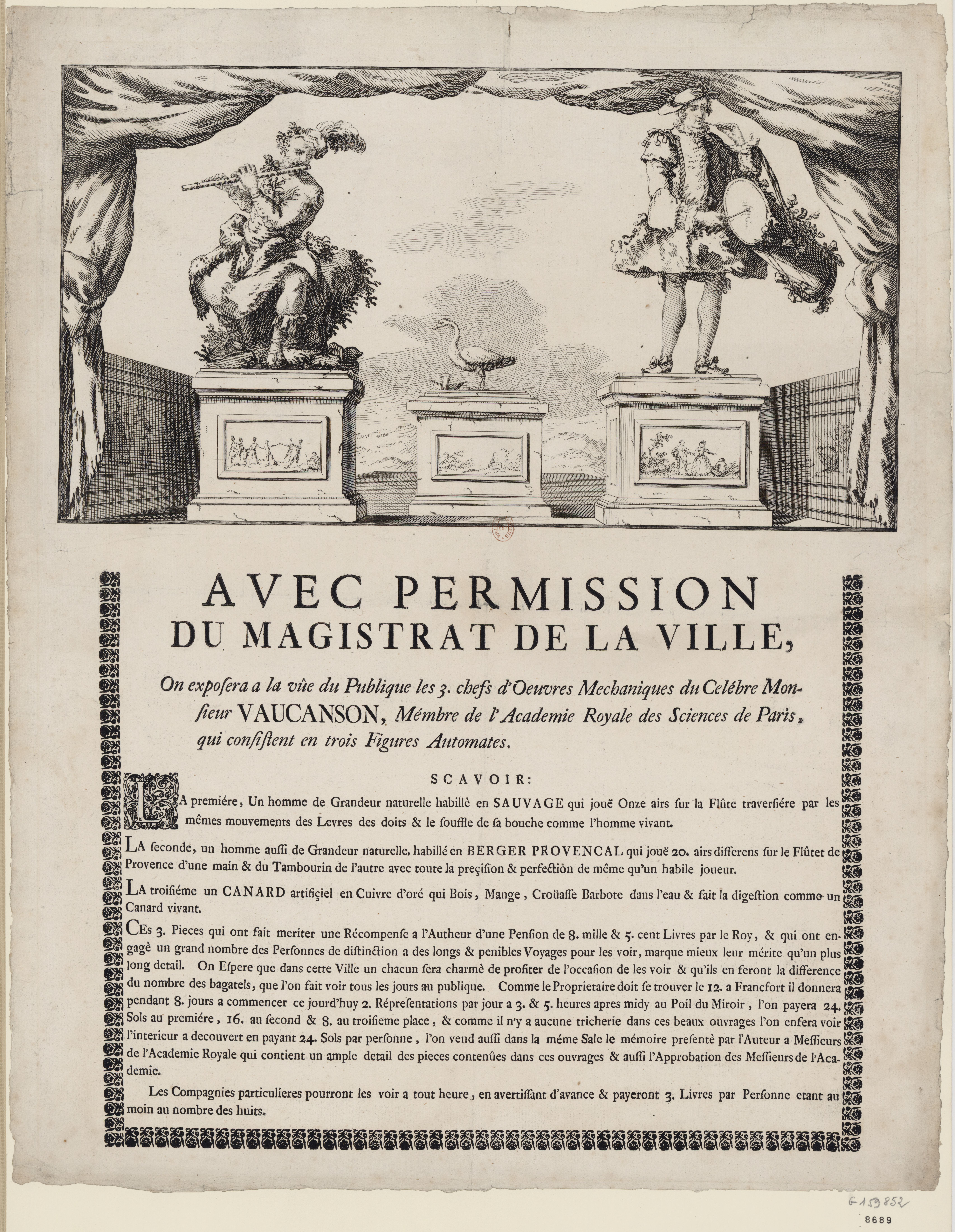 Gravure